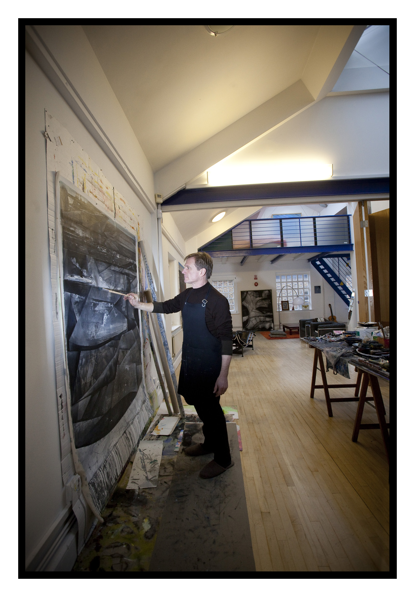 Herman Maes in atelier @ London